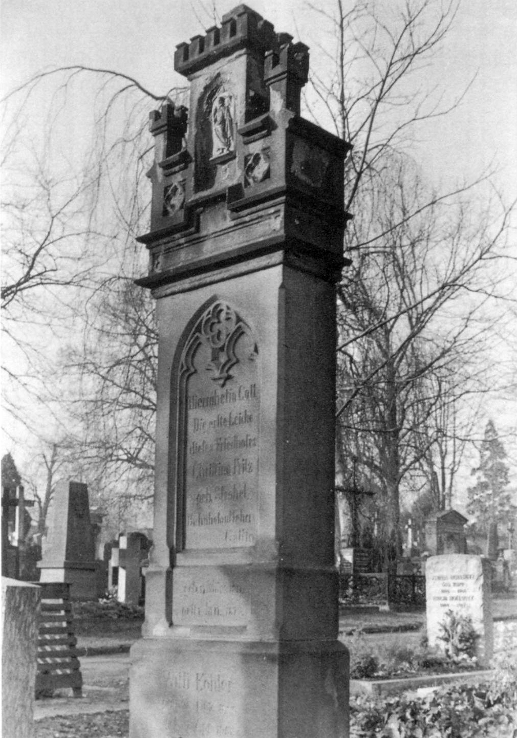 Grab von Christiane Fritz geb. Strobel (1817–1873), erste Bestattung auf dem Pragfriedhof Stuttgart, 1873.